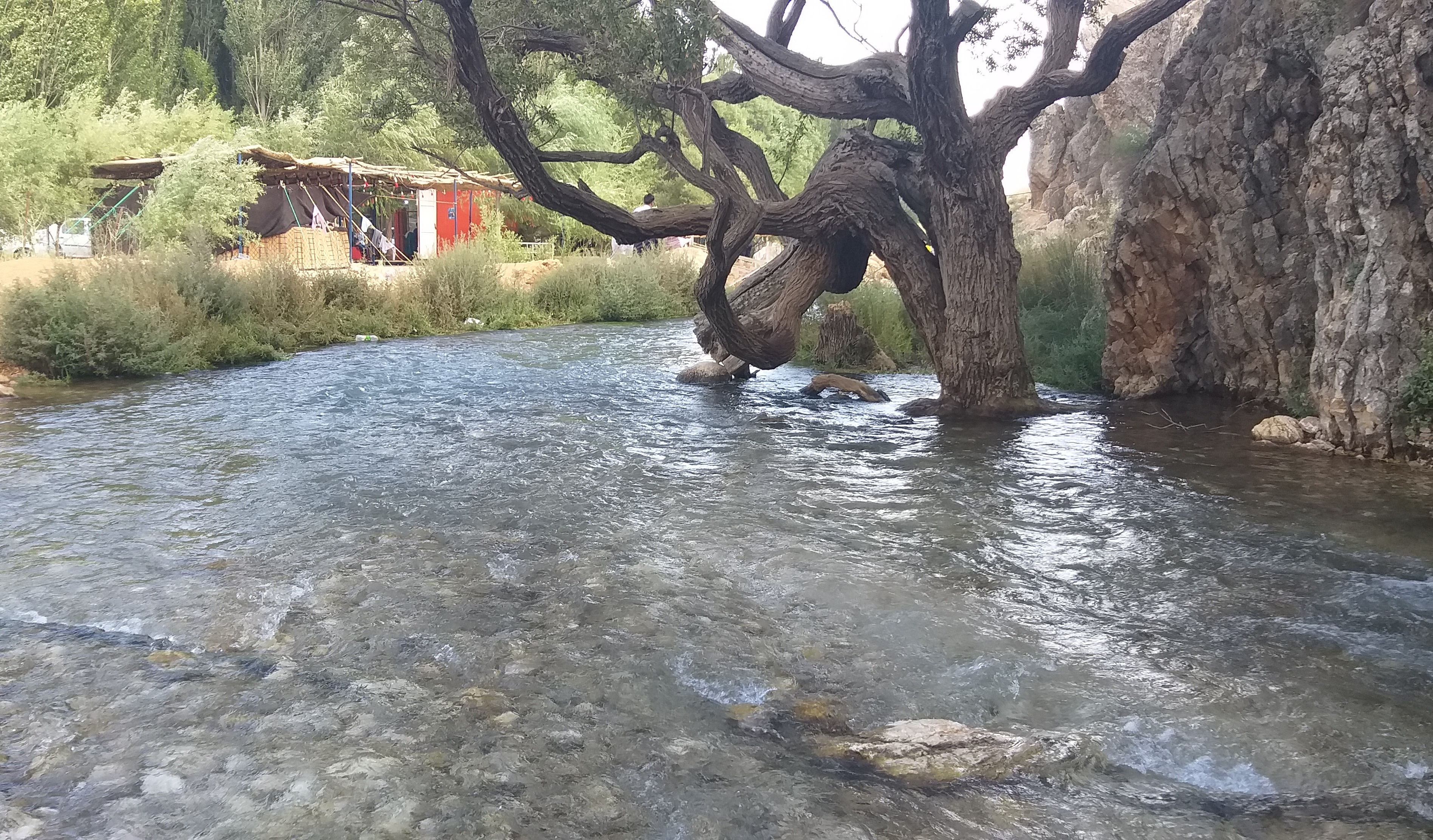 چشمه شش‌پیر در شهرستان سپیدان استان فارس